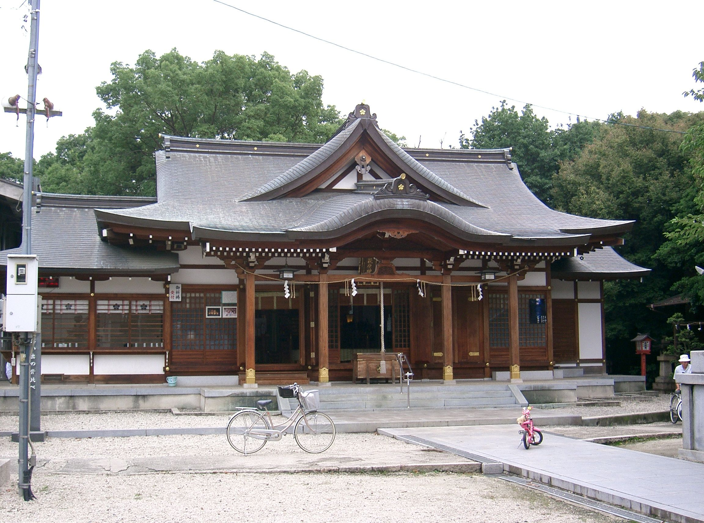 萩原神社 拝殿